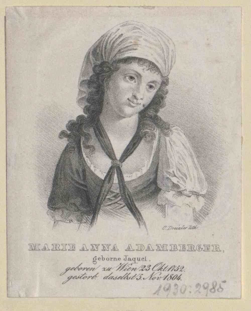 Die Wiener Schauspielerin Anna Marie Nanny Adamberger, geborene Jacquet (1752-1807)